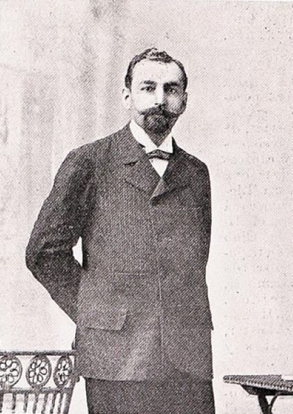 Enrique Deformes Villegas (Valdivia, 20 de abril de 1866 - Valparaiso, 20 de mayo de 1920) fue un médico y benefactor chileno.